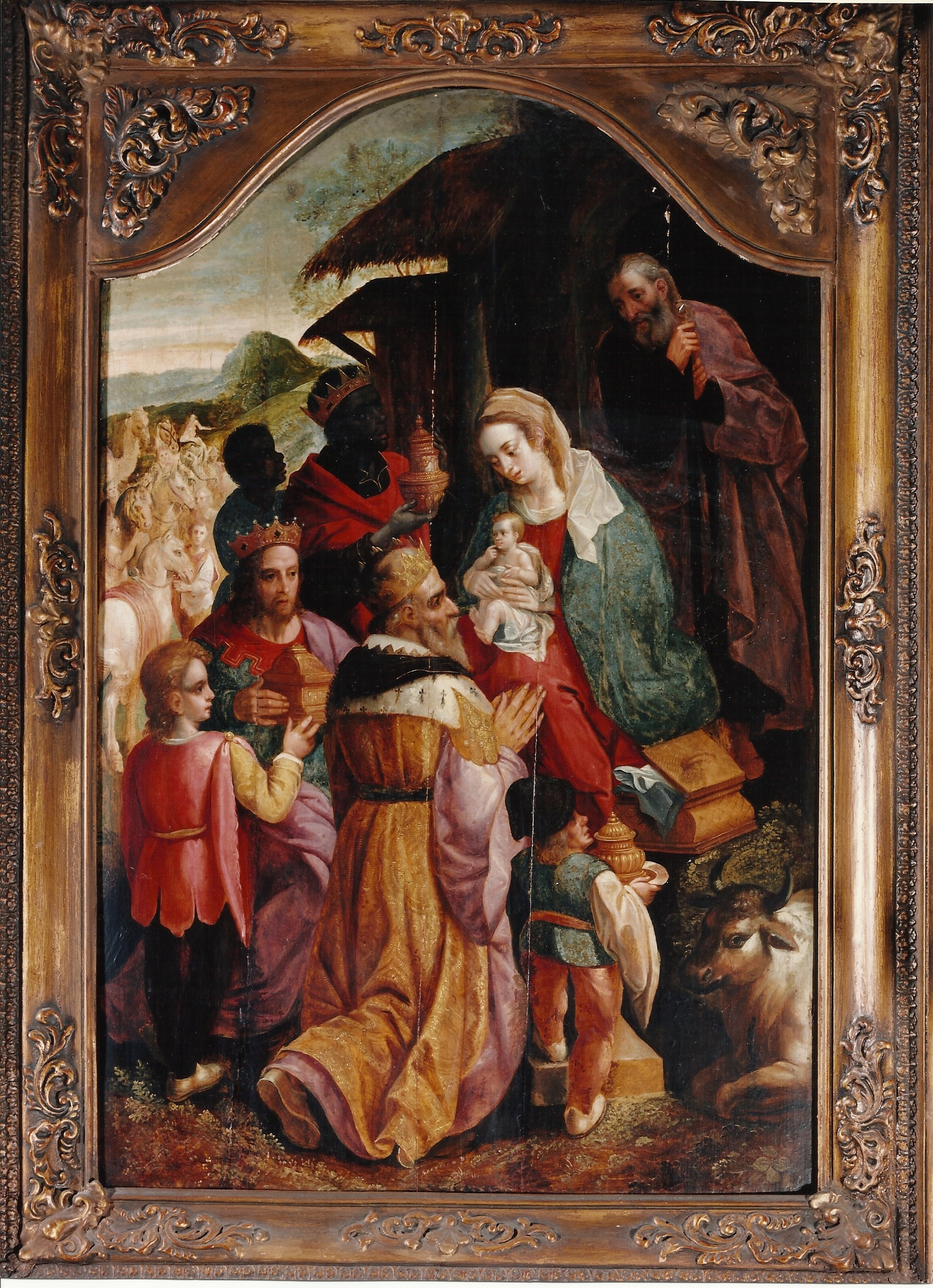 Kongenes tilbedelse - Melchior og Caspar kneler for Madonna. Tolkning i kobberstikk av Cornelius Galle, fra et maleri av Giovanni Stradanus (Jan van der Straat). Dette maleriet var malt på slutten av 1600-tallet, gitt i gave til Trefoldighetskirken i 1887 av Anton Chr. Houen. Brannskadet i 1902 og restaurert av Riksantikvaren i 1946.